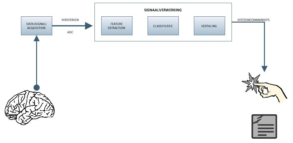 Basis ontwerp en werking van een algelmeen BCI systeem.